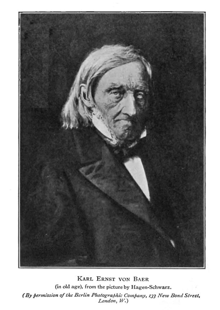 Karl Ernst von Baer in old age